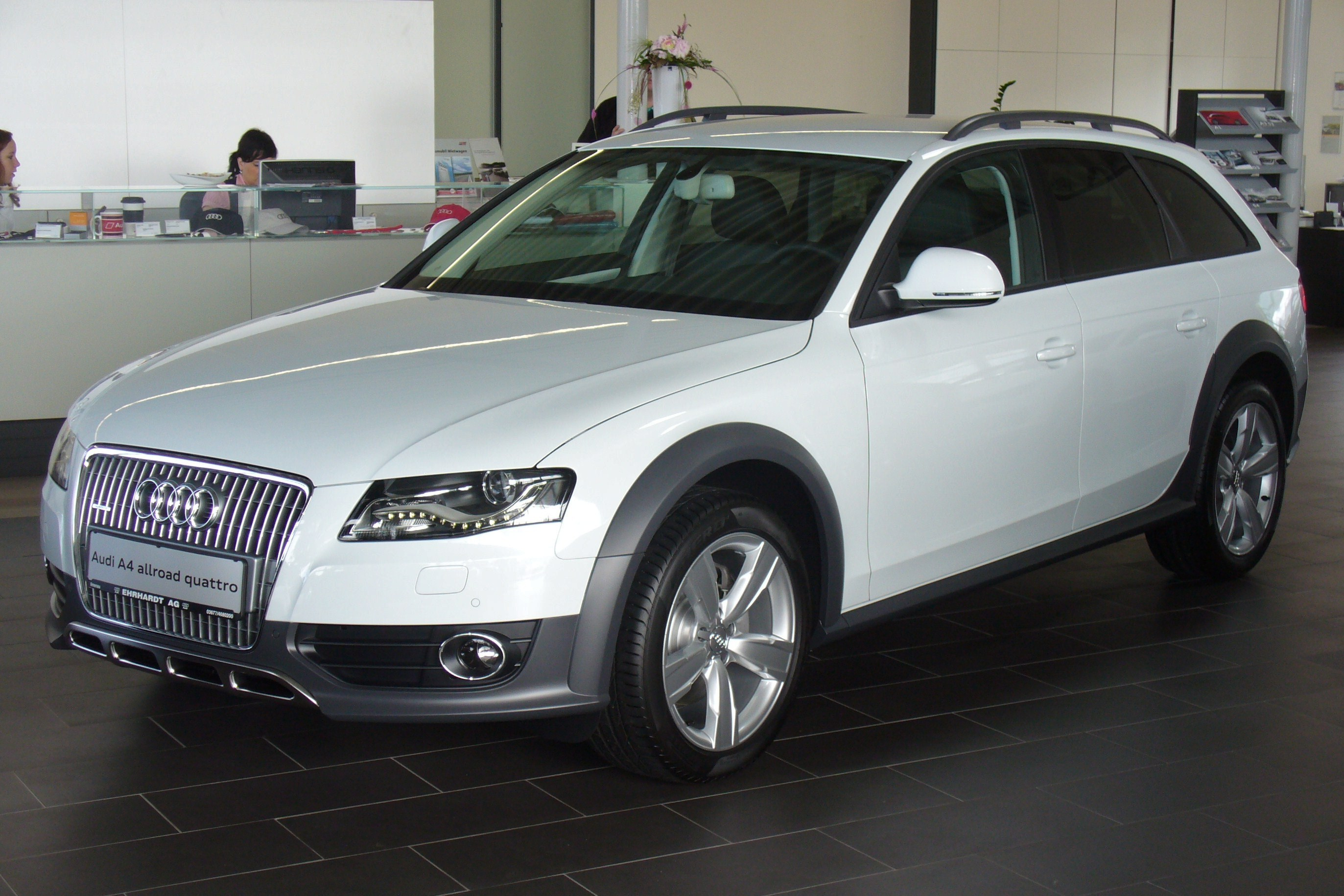 Audi A4 allroad quattro